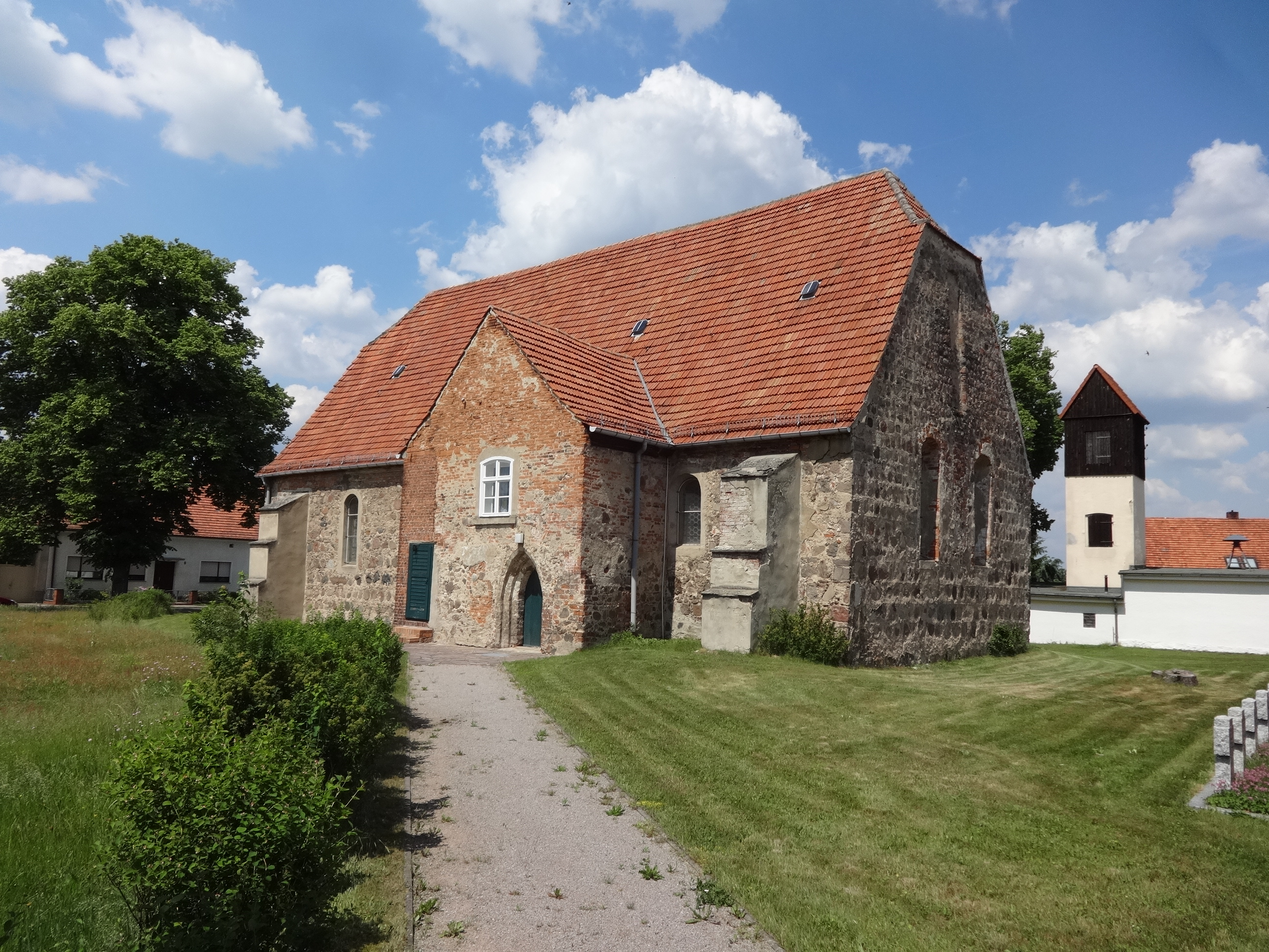 Die Dorfkirche in Paplitz entstand vermutlich im 13. oder 14. Jahrhundert als Feldsteinkirche. Sie wurde im Dreißigjährigen Krieg zerstört und wiederaufgebaut. Im Innern befinden sich ein Altaraufsatz, der in der Zeit um 1660 bis 1670 entstand und in seiner Predella das Abenmahlsbild und im Hauptfeld die Kreuzigungsszene Jesu Christi zeigt.